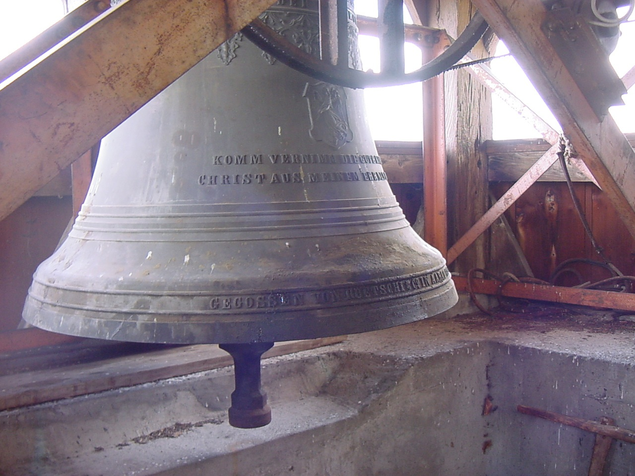 Die grösste Glocke im Kirchturm Gerzensee wiegt 1024 kg, ist auf f' gestimmt und wurde 1892 gegossen.